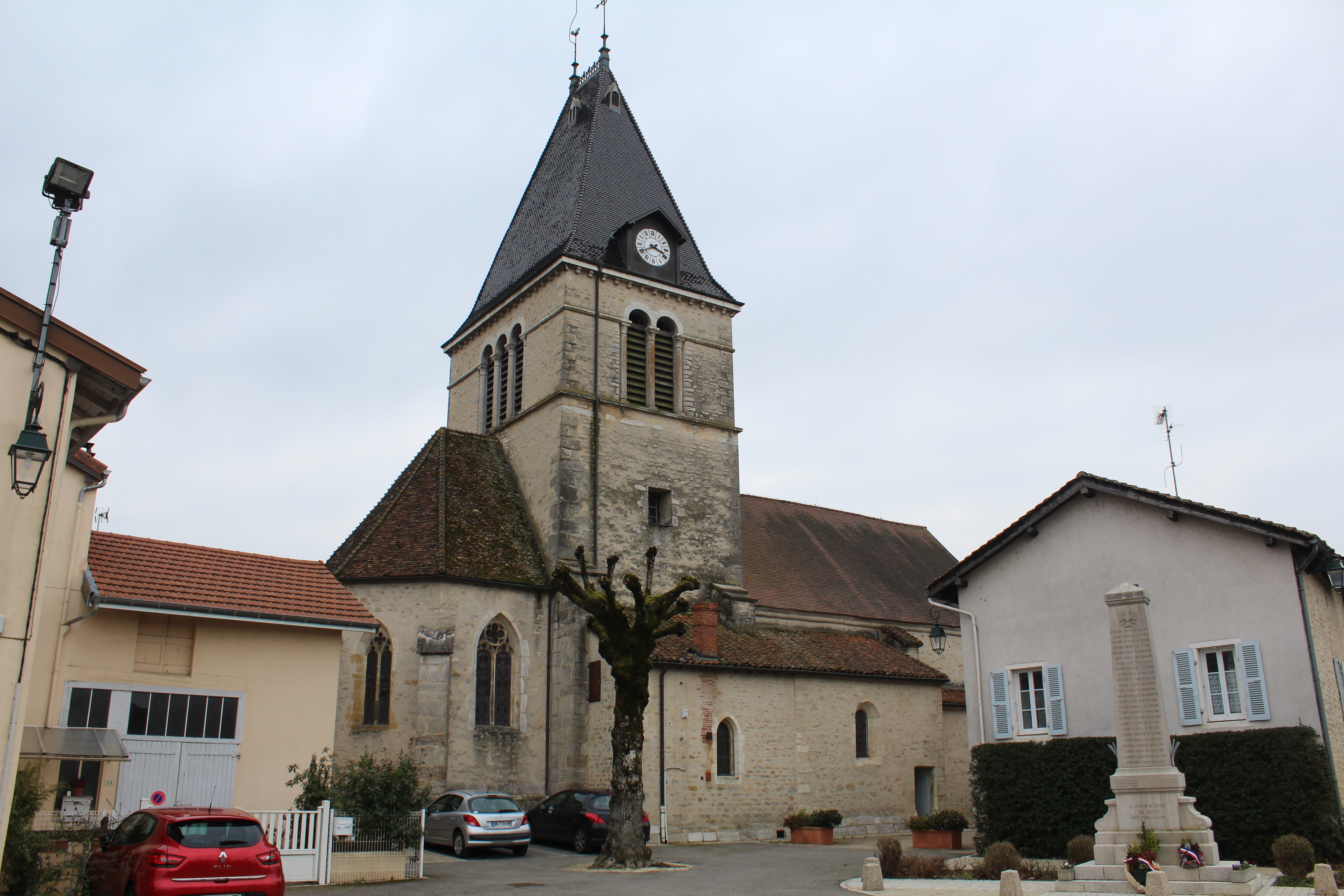 Église Saint-Marcel de Tossiat.